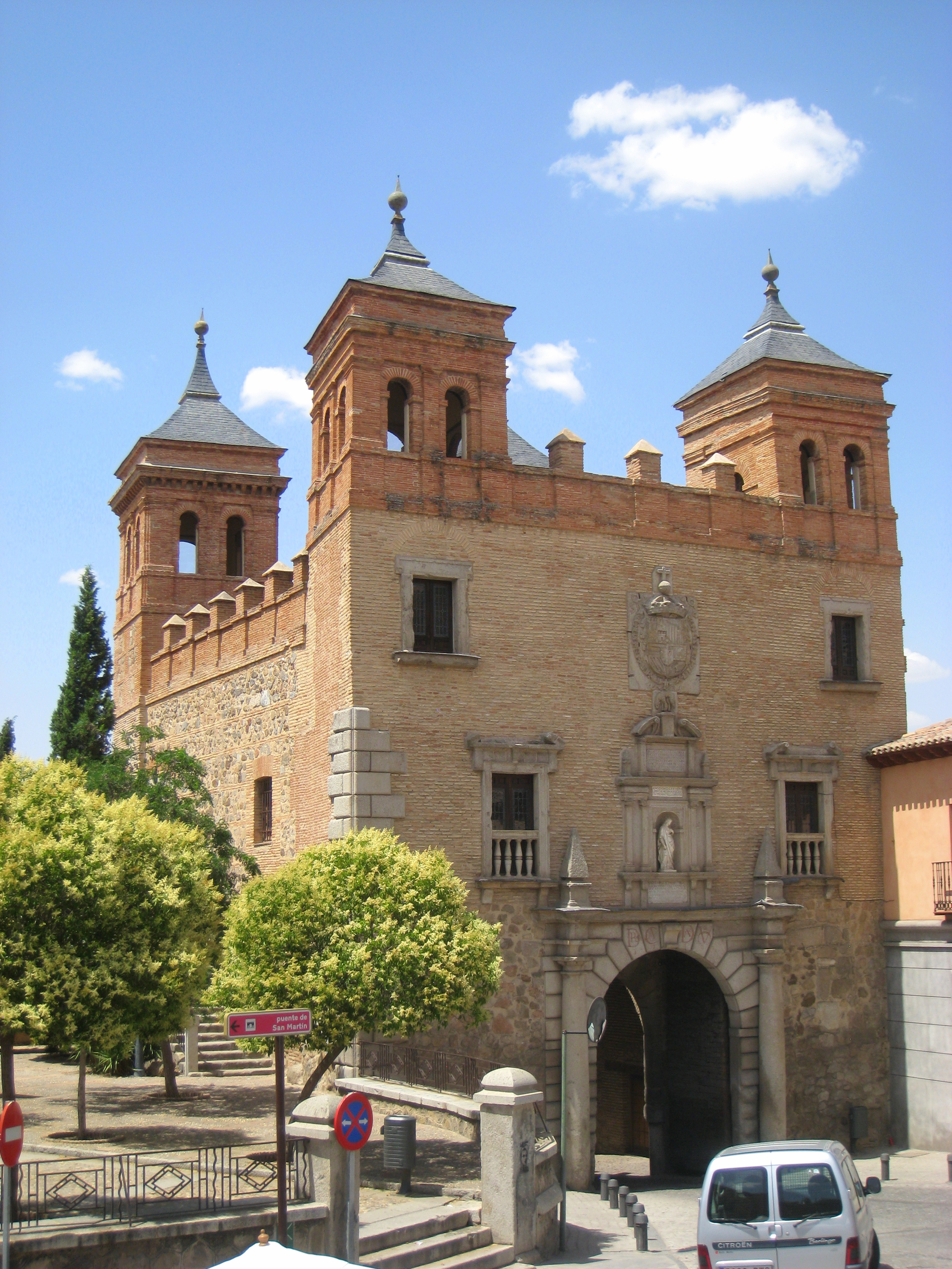 Puerta del Cambron, Toledo, Spain.